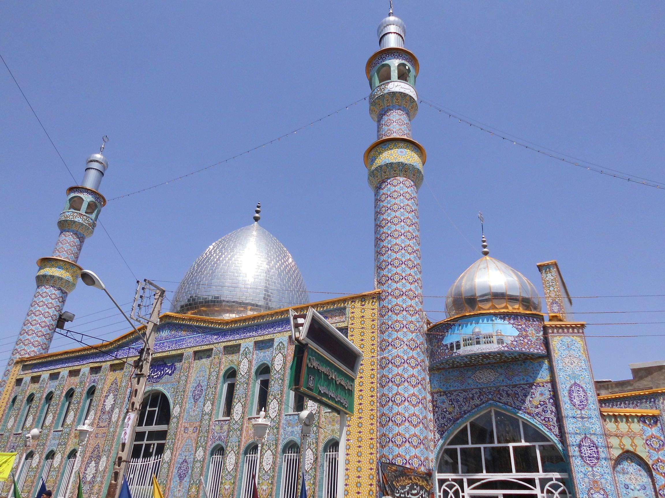 امام زاده سید بهلول